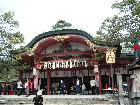 Praying hall (haiden) at Fushimi Inari shrine